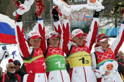 Rosyjskie biathlonistki cieszące się ze zdobycia złotego medalu na Igrzyskach w Turynie